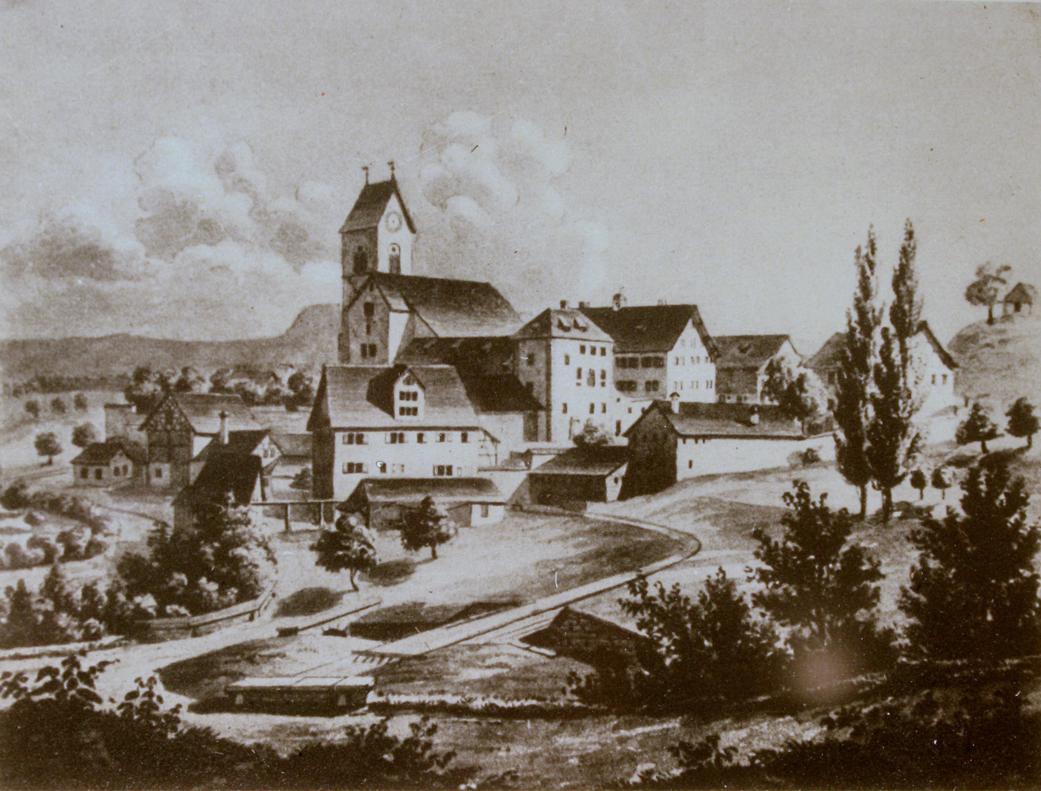 Rüti (ZH) : Kloster Rüti, Ansicht von Nordosten, nach der Zeichnung von Wilhelm Schulthess, um 1840